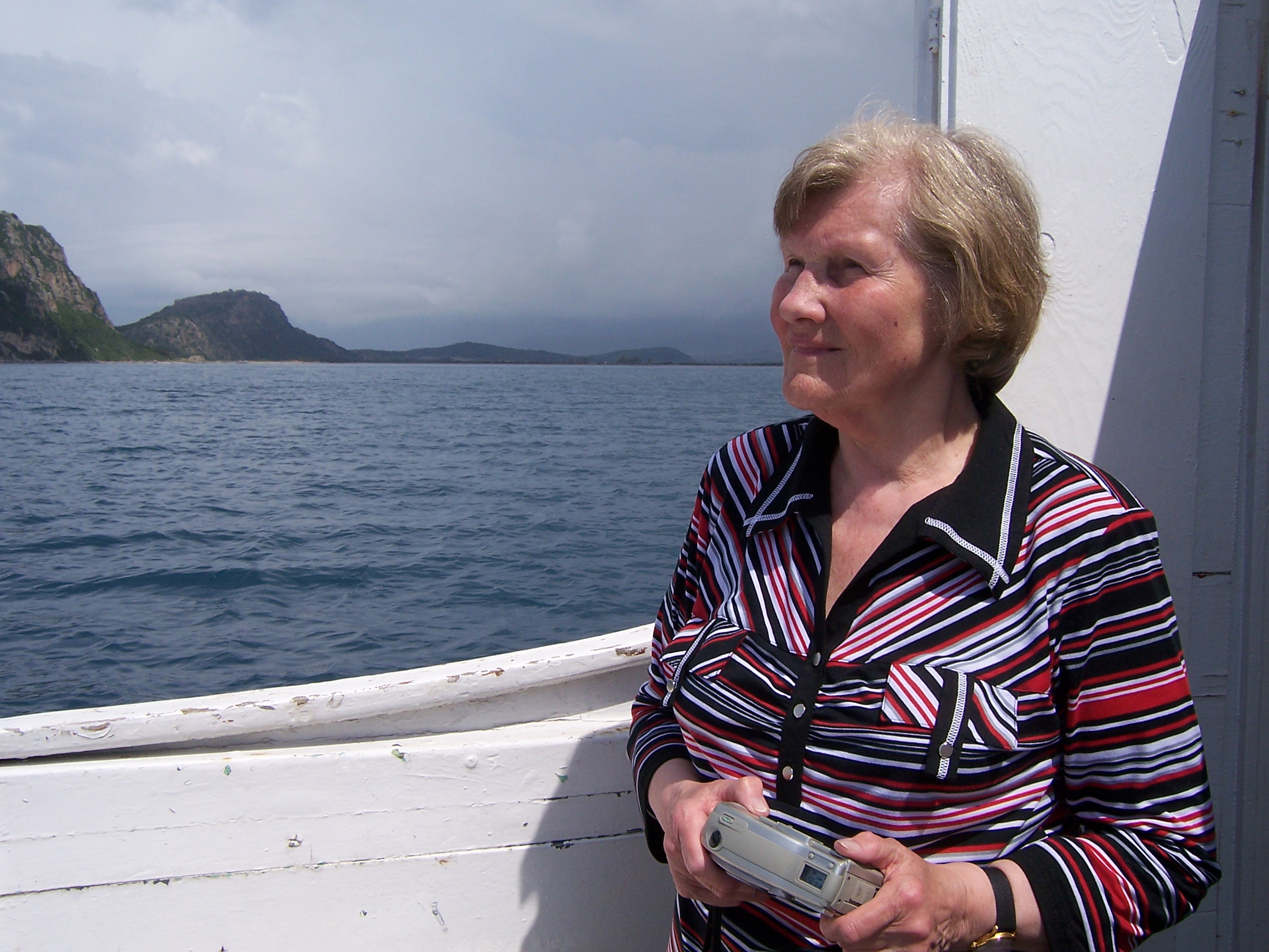 Лада Михайловна Шафранова на морской прогулке по Наваринскому заливу (Греция), апрель 2009